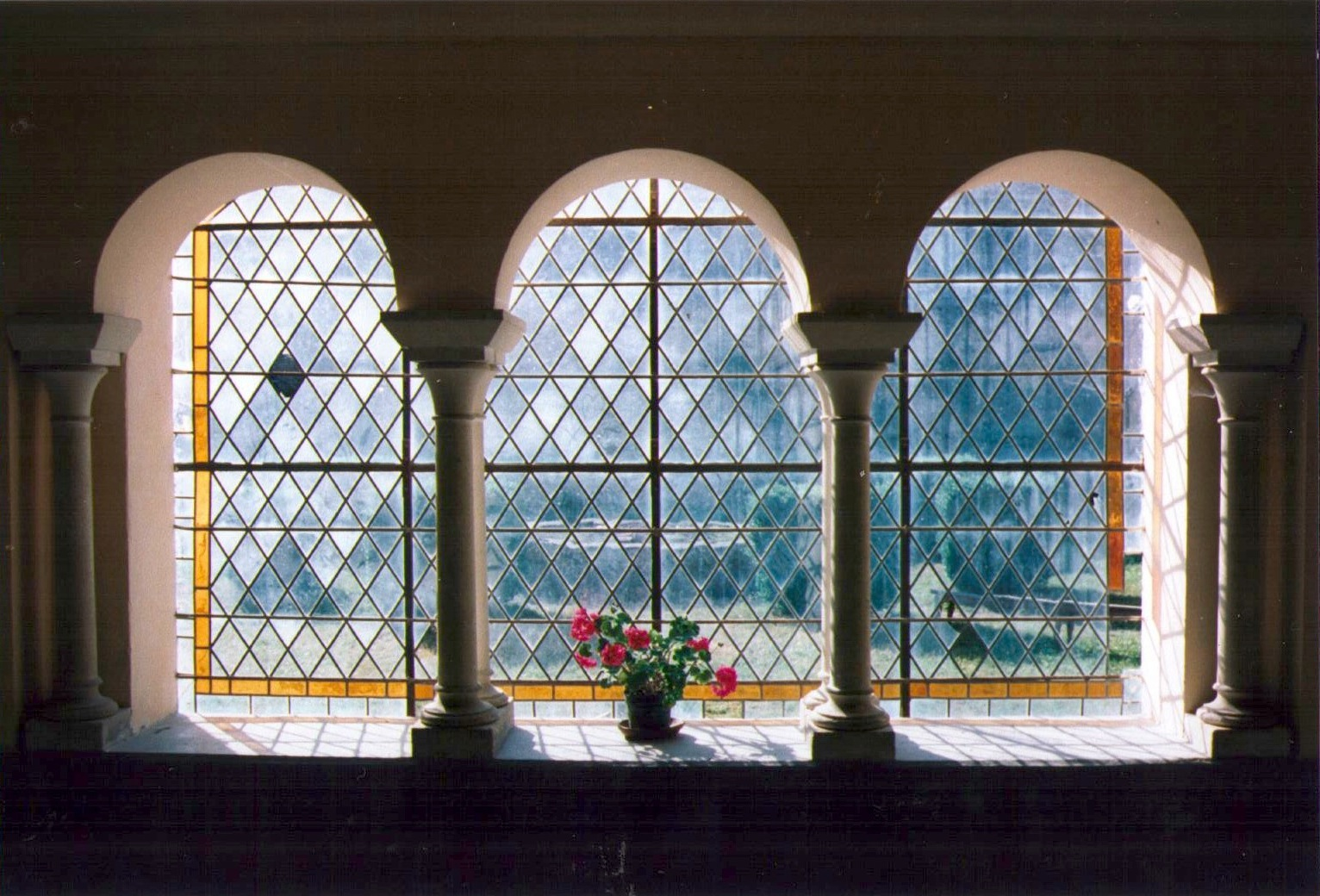 Vitrail de l'Abbaye de Bonnecombe, cloître, (du temps de la communauté de l'Arche).